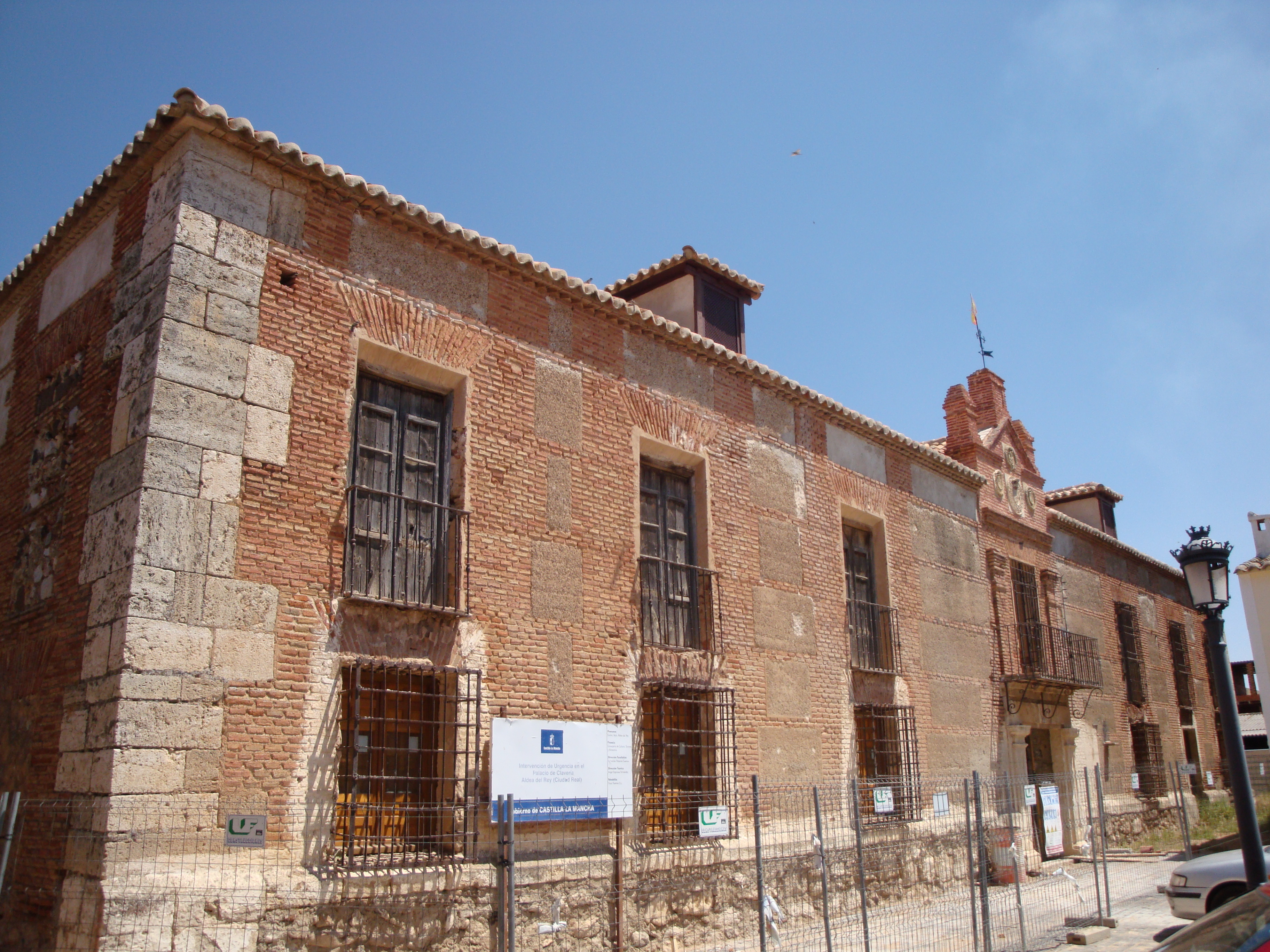 Vista de la fachada del Palacio de Clavería, Aldea del Rey (Ciudad Real).